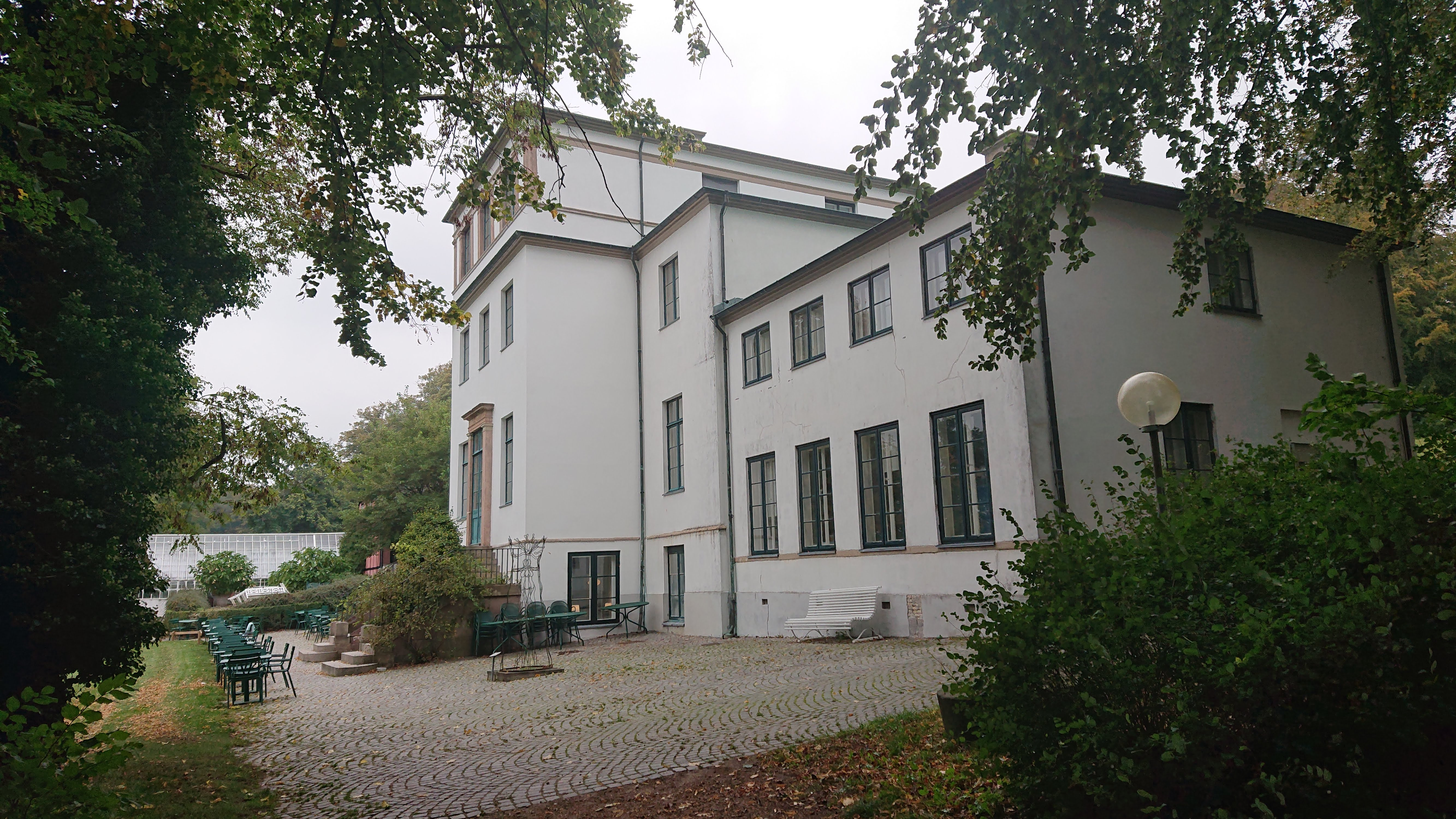 Sophienholm, Nybrovej 401, 2800